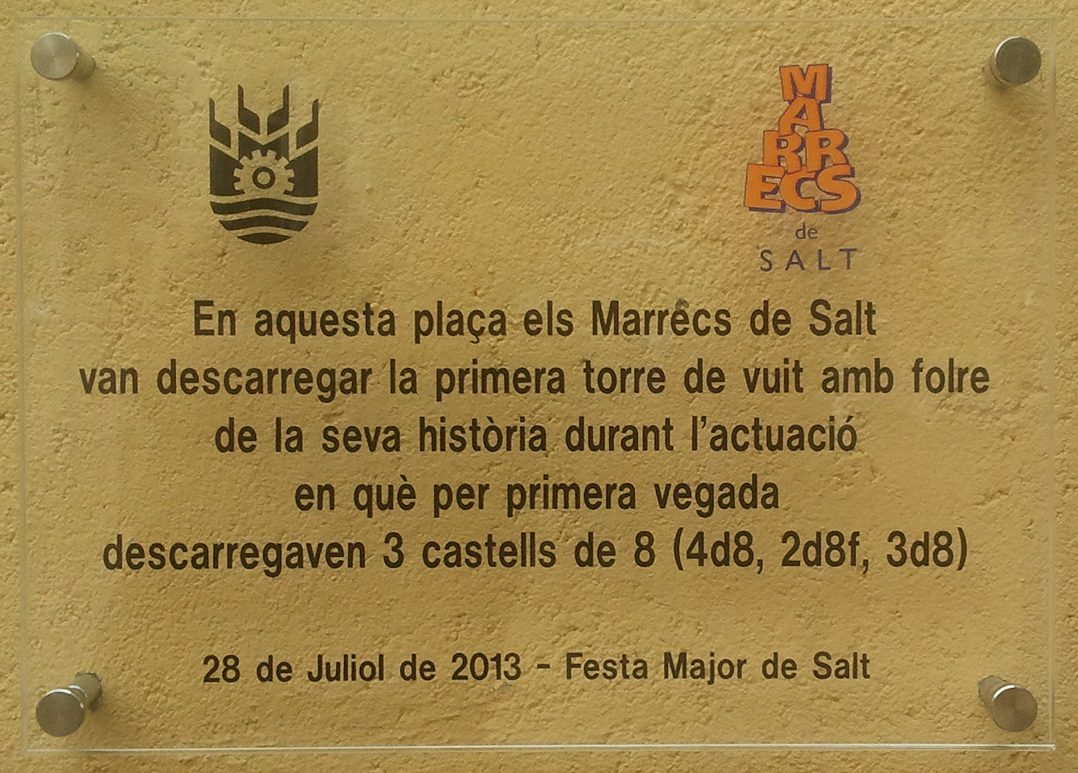 Placa dedicada als Marrecs de Salt a la plaça Lluís Companys, a l'Ajuntament de Salt per commemorar la primera actuació en descarregar tres castells de vuit (4 de 8, 2 de 8 amb folre i 3 de 8), el 2013